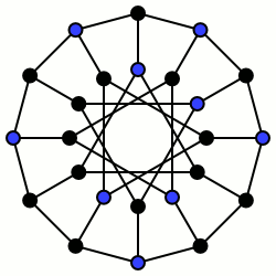 Example of vertex independent set over a graph